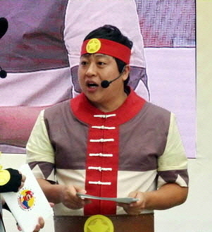 한국닌텐도 슈퍼 마리오 캠페인 이벤트 현장